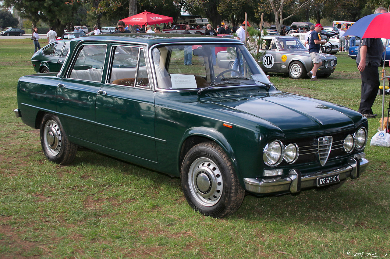 1970 Giulia 1600 Super - fvr